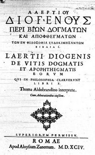 Portada de la primera edición del libro en 1792